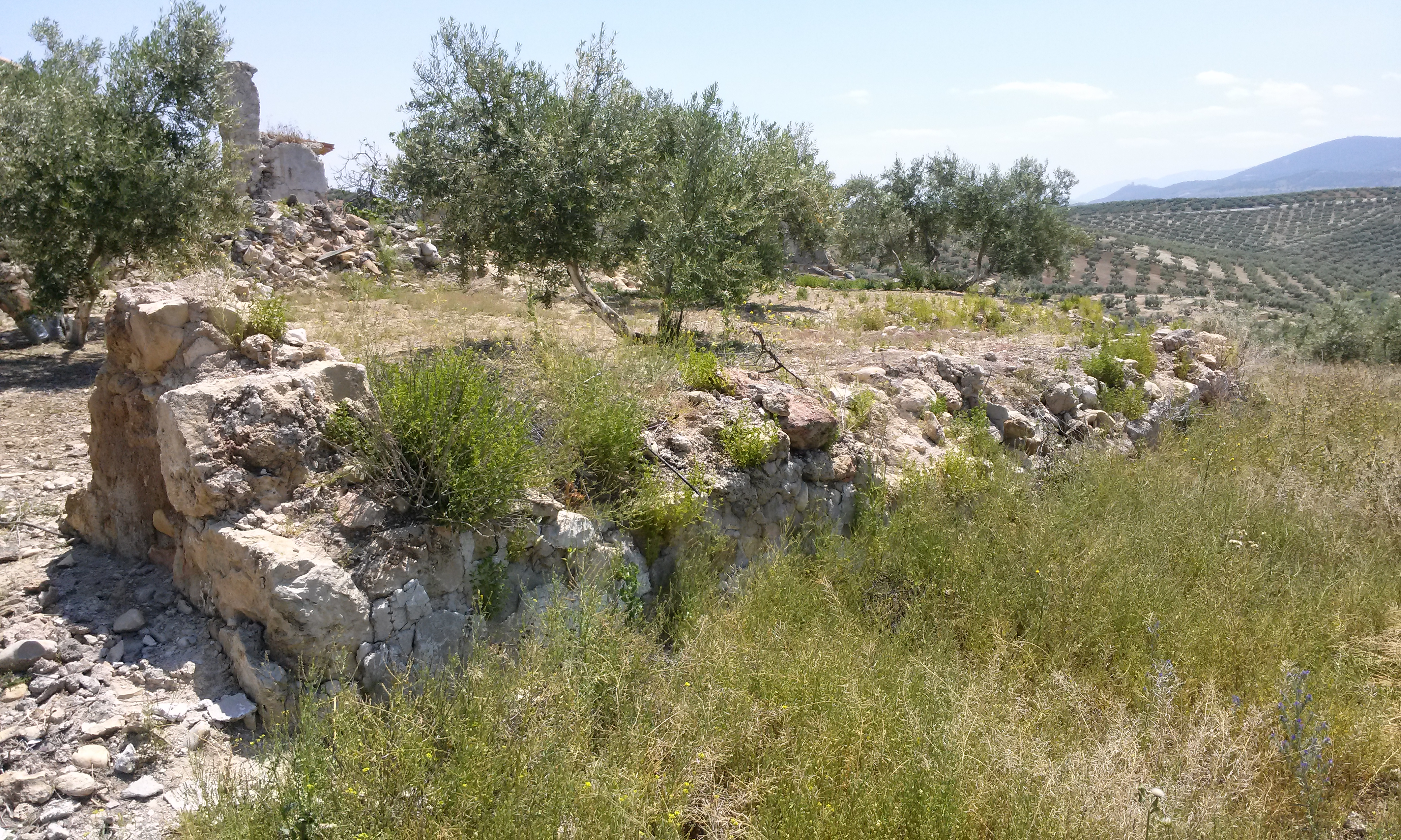 Arranques de la torre medieval (castillo de La Iglesia).